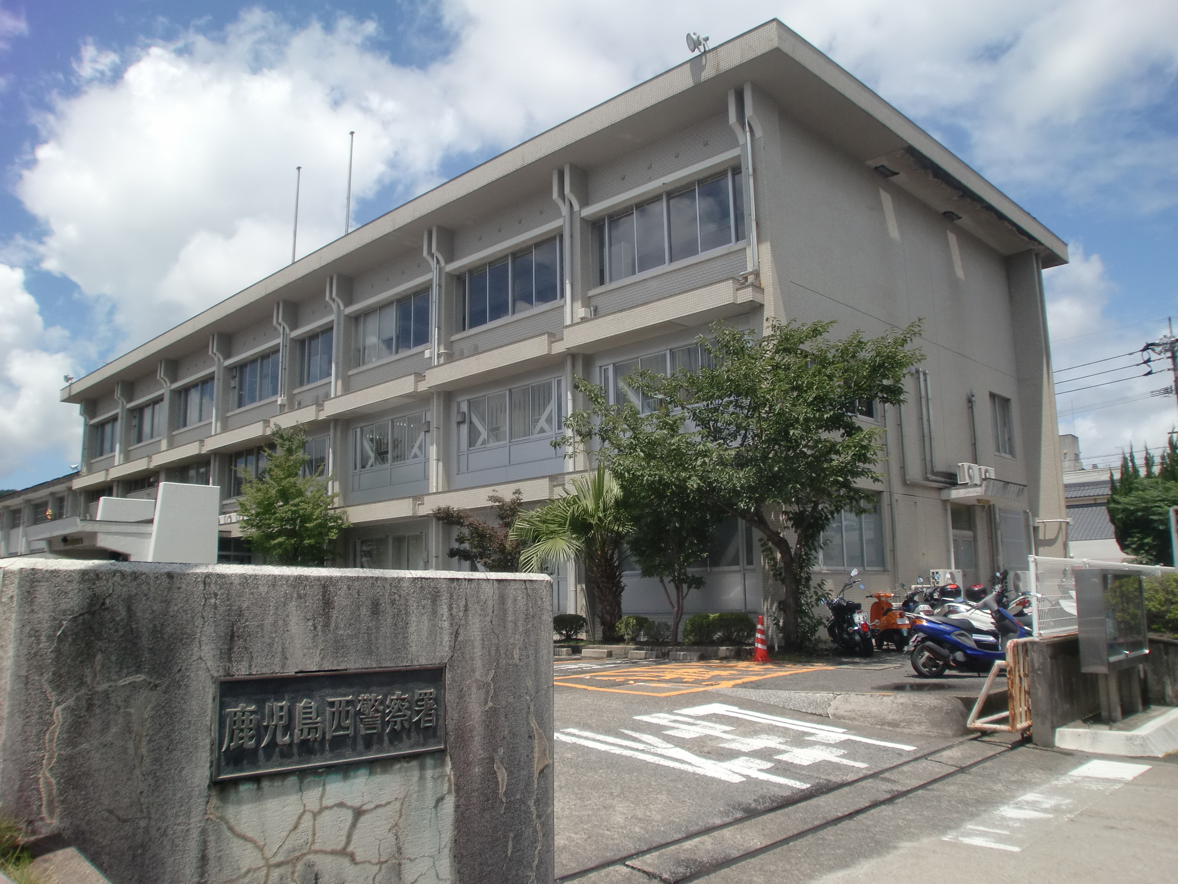 鹿児島西警察署の外観